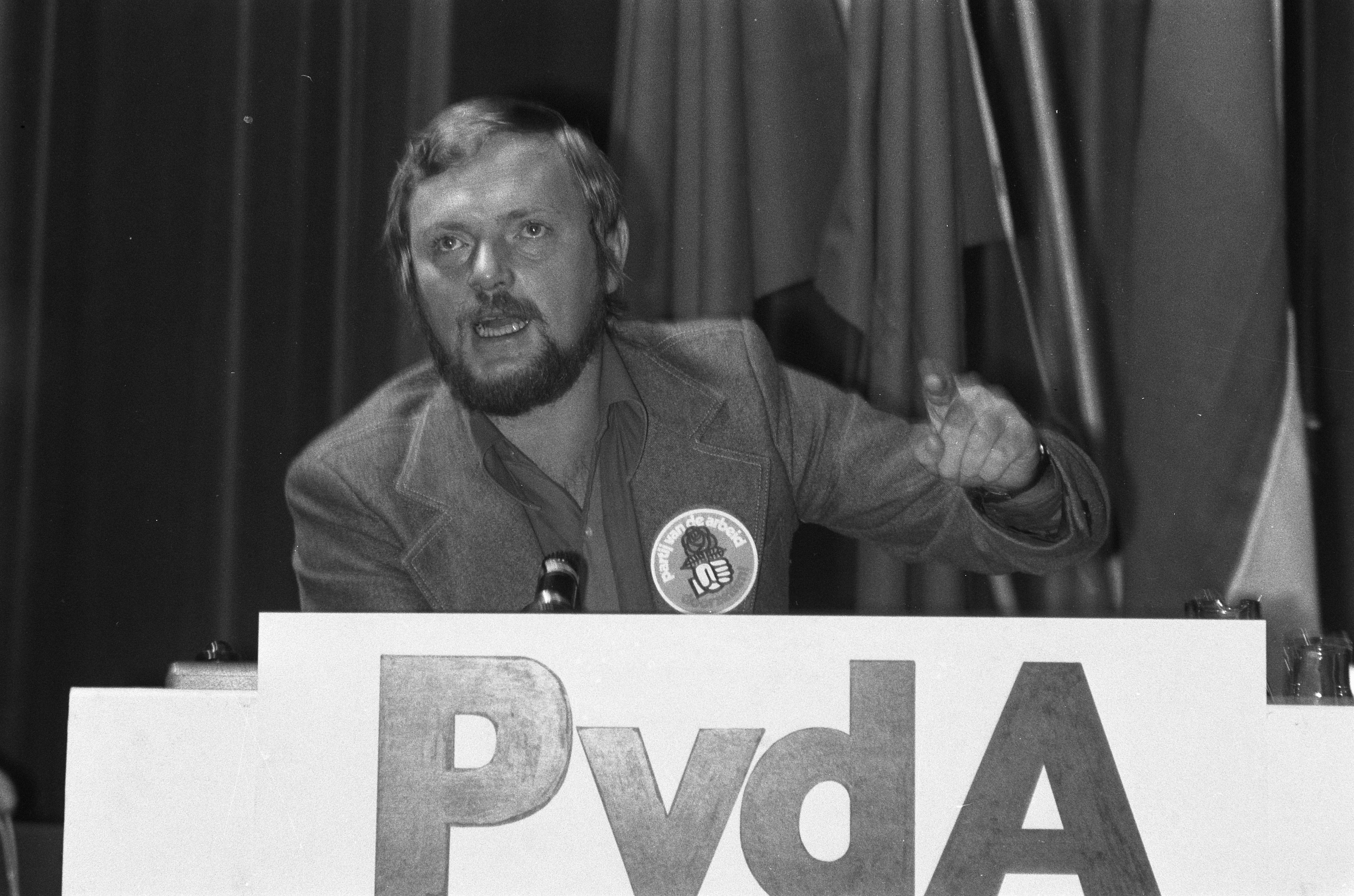 Collectie / Archief : Fotocollectie Anefo Reportage / Serie : [ onbekend ] Beschrijving : Veertiende PvdA-congres in Amsterdamse RH, Jan Nagel aan het woord Datum : 15 september 1973 Locatie : Amsterdam, Noord-Holland Trefwoorden : congressen, politiek, toespraken Persoonsnaam : Nagel, Jan Fotograaf : Peters, Hans / Anefo Auteursrechthebbende : Nationaal Archief Materiaalsoort : Negatief (zwart/wit) Nummer archiefinventaris : bekijk toegang 2.24.01.05 Bestanddeelnummer : 926-6842